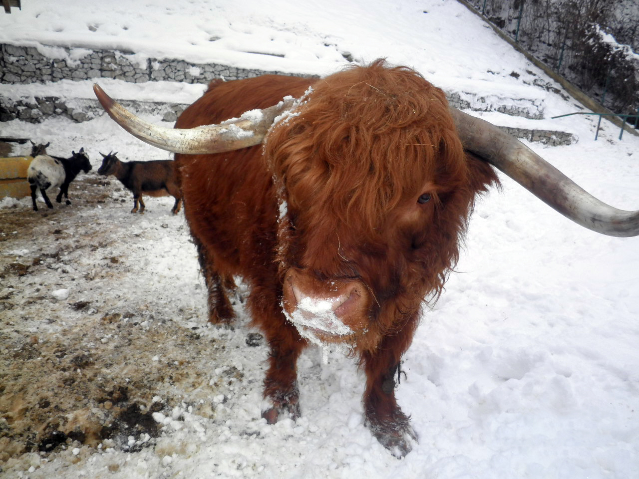 Pionirska dolina